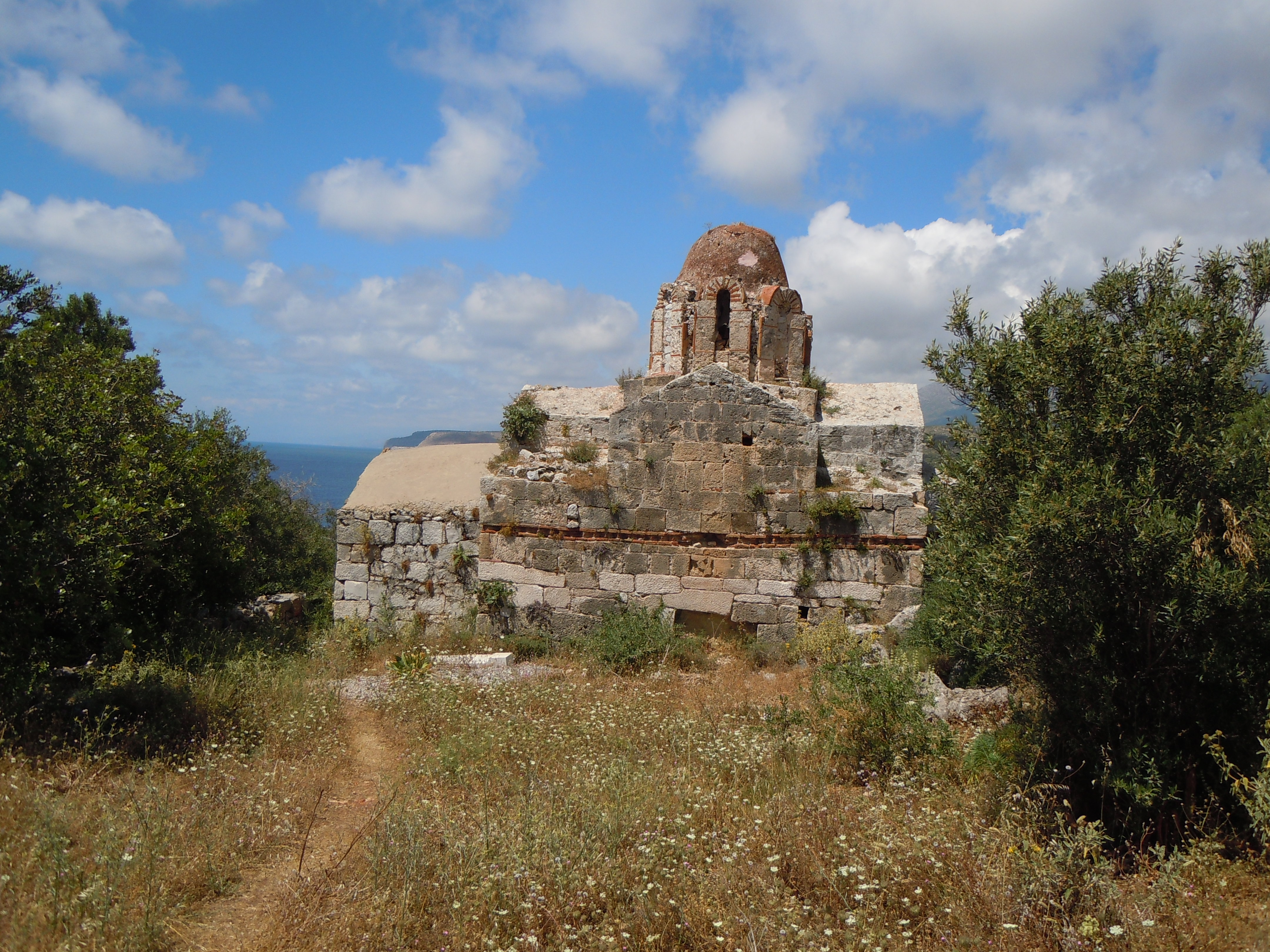 Eglise Panagia à Episkopi, Magne, Laconie